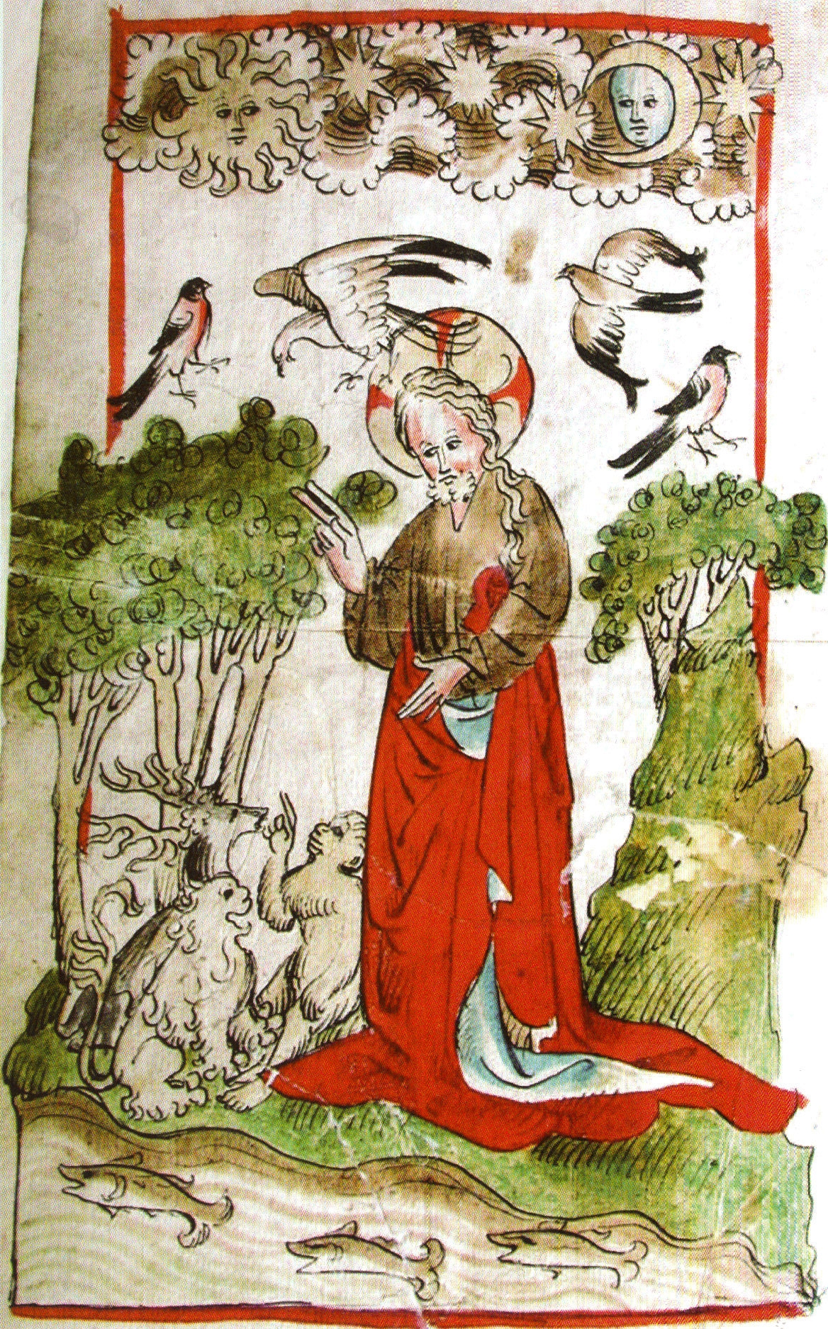 Stadtbibliothek Mainz Hs II 64 (Historienbibel, Werkstatt Diebold Lauber, 2. Viertel 15. Jh.), Bl. 13v